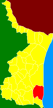 El Municipio de Aldama en Tamaulipas